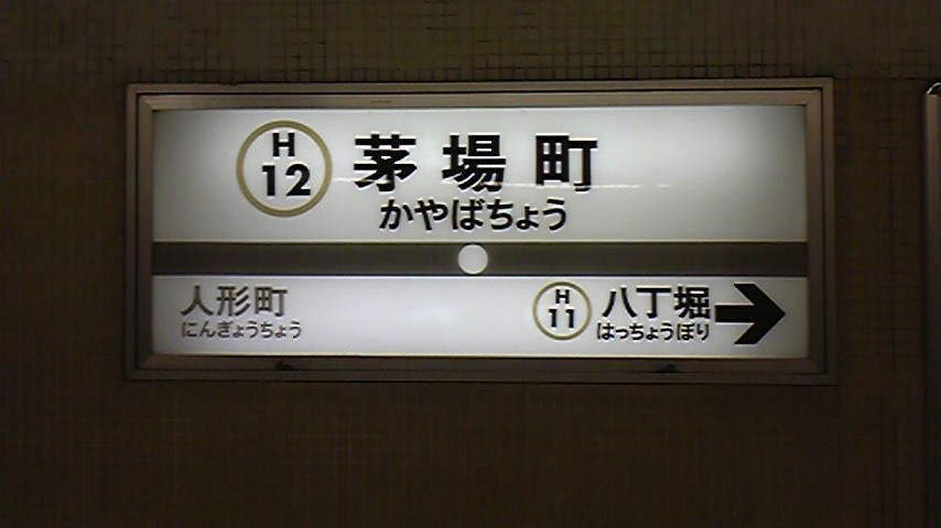 茅場町駅（日比谷線）の大型駅名標 作成日：2010年11月19日 撮影日：2010年1月30日 撮影者：スラップジャイアン